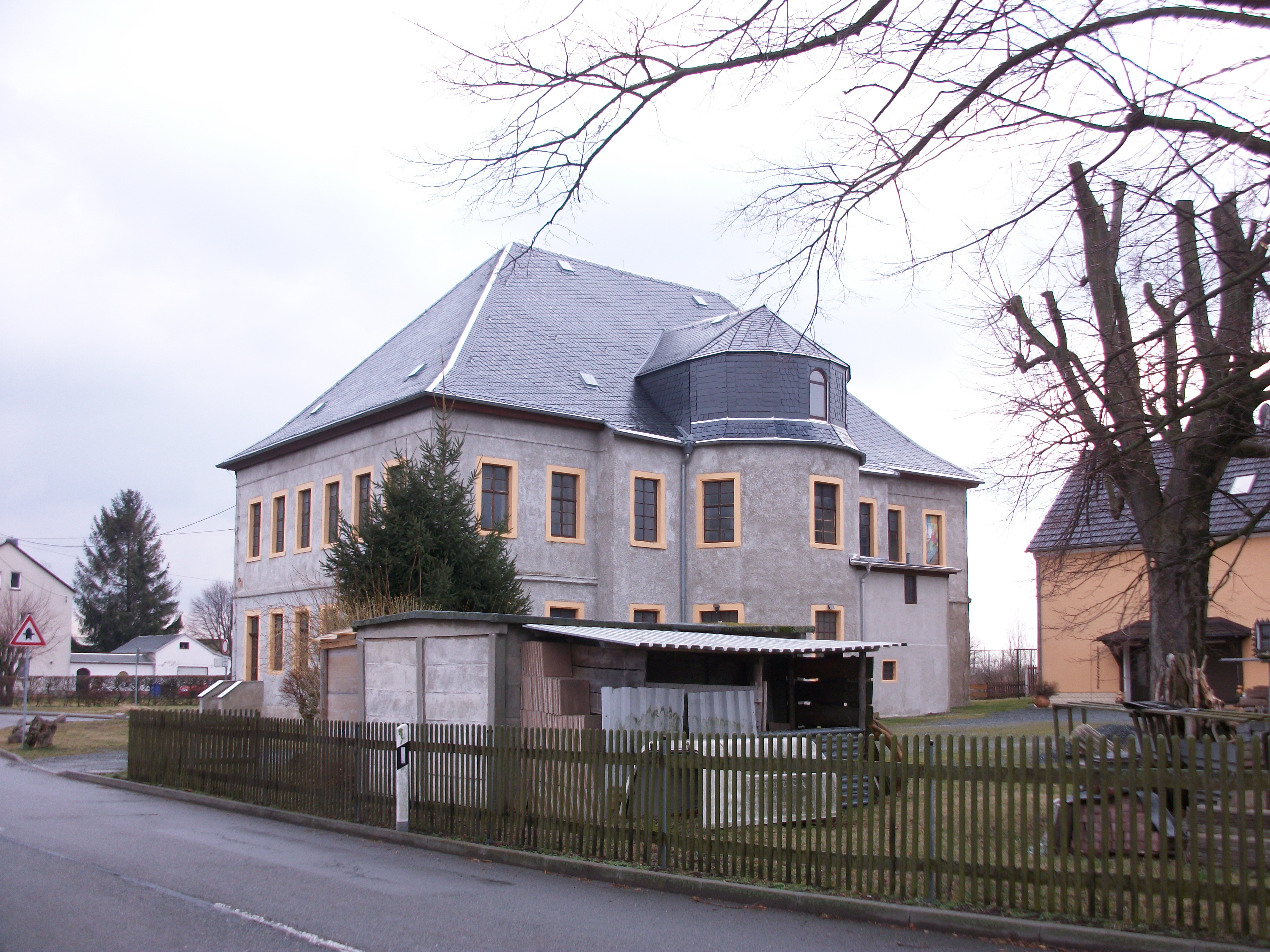 Ehemaliger Gasthof Katze in Obertirschheim (Tirschheimer Anteil)